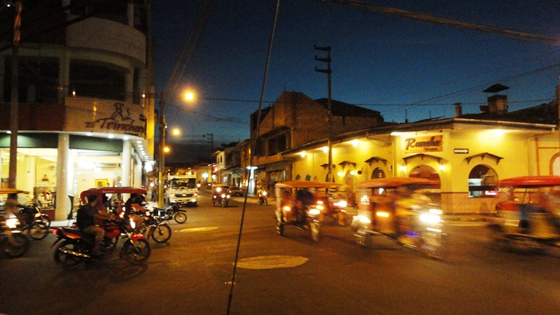 Restaurantes en la esquina de una calle de Iquitos